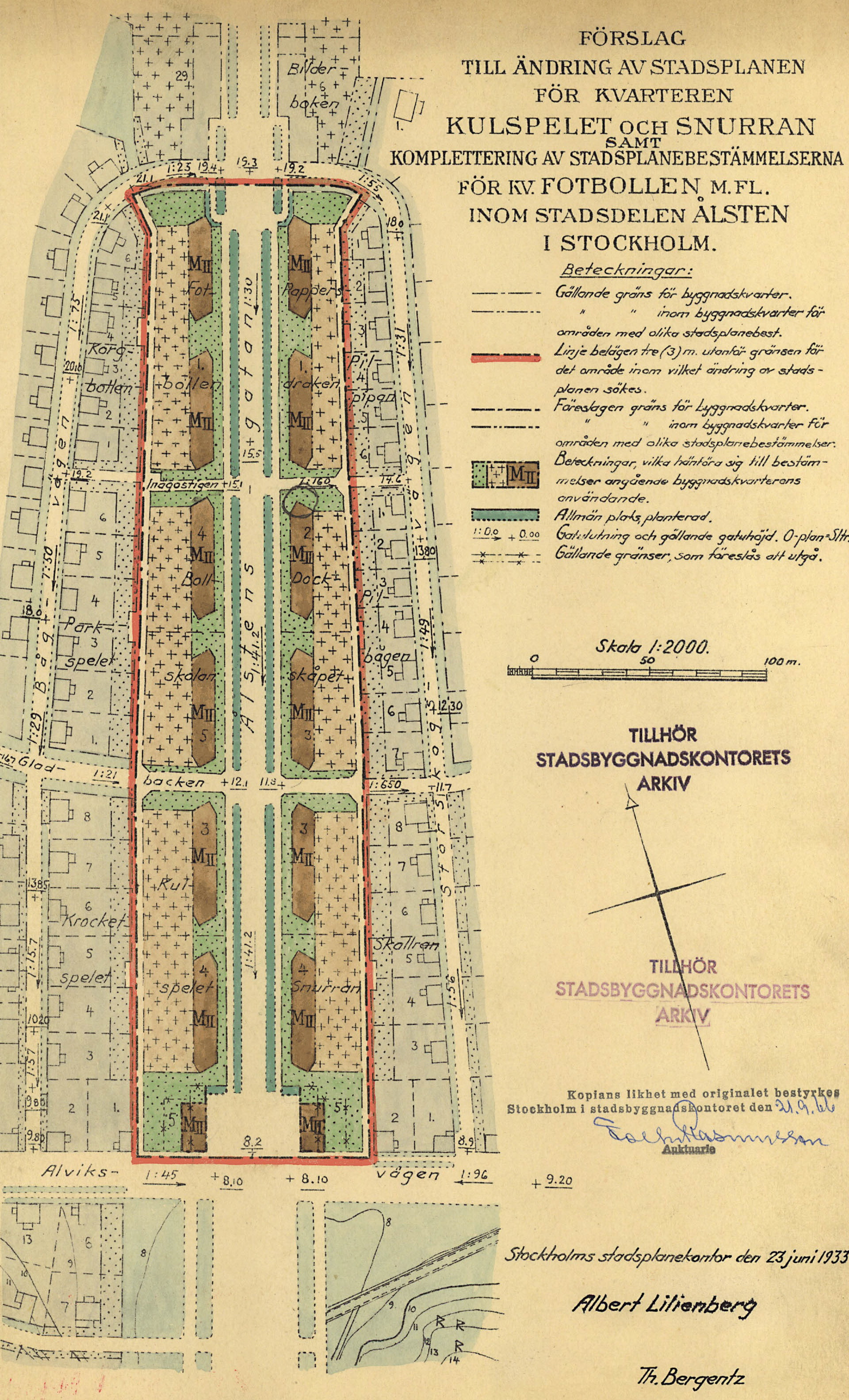 Reviderad stadsplan över Ålstensgatans radhusbebyggelse